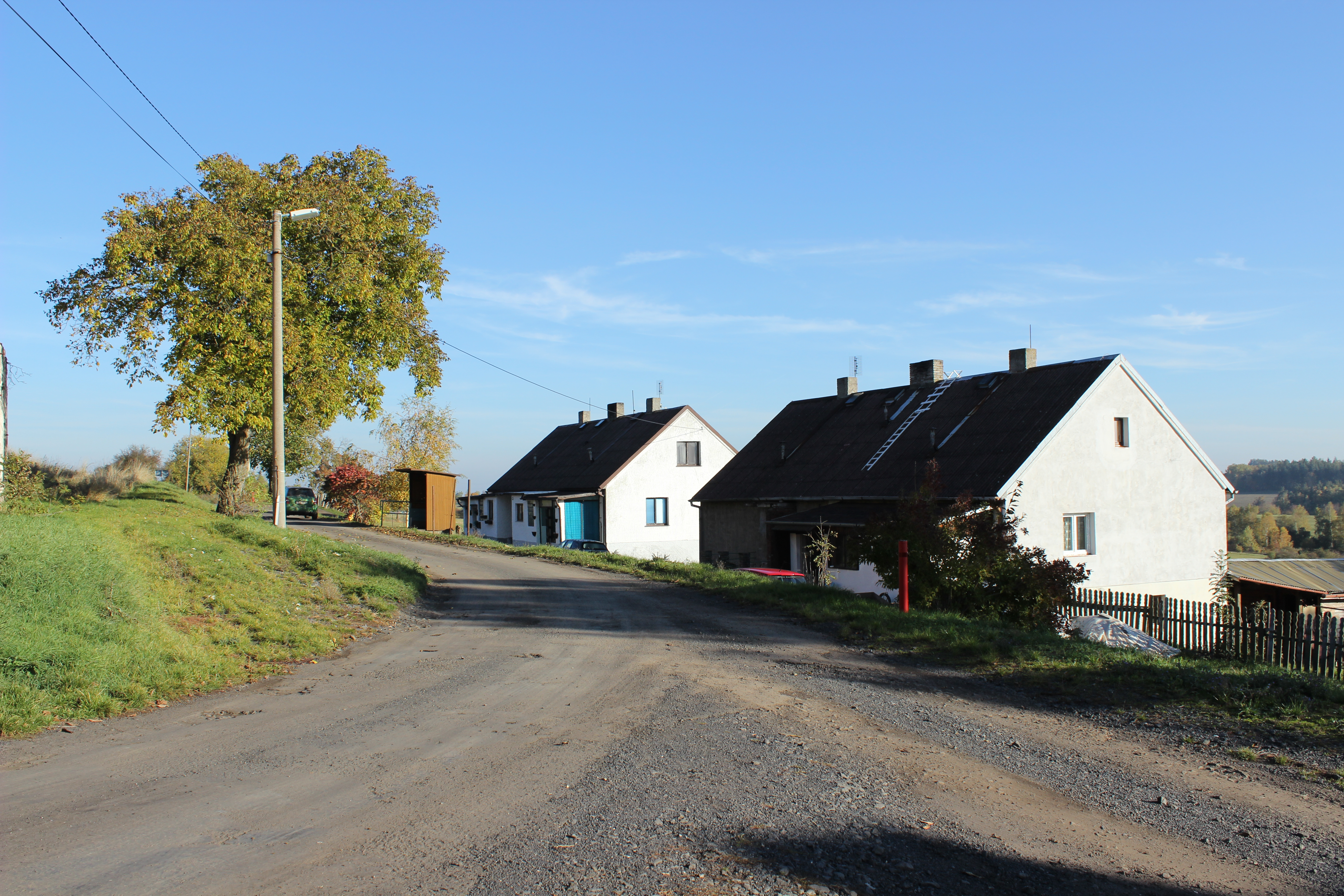 Zástavba v Budově, části Verušiček.